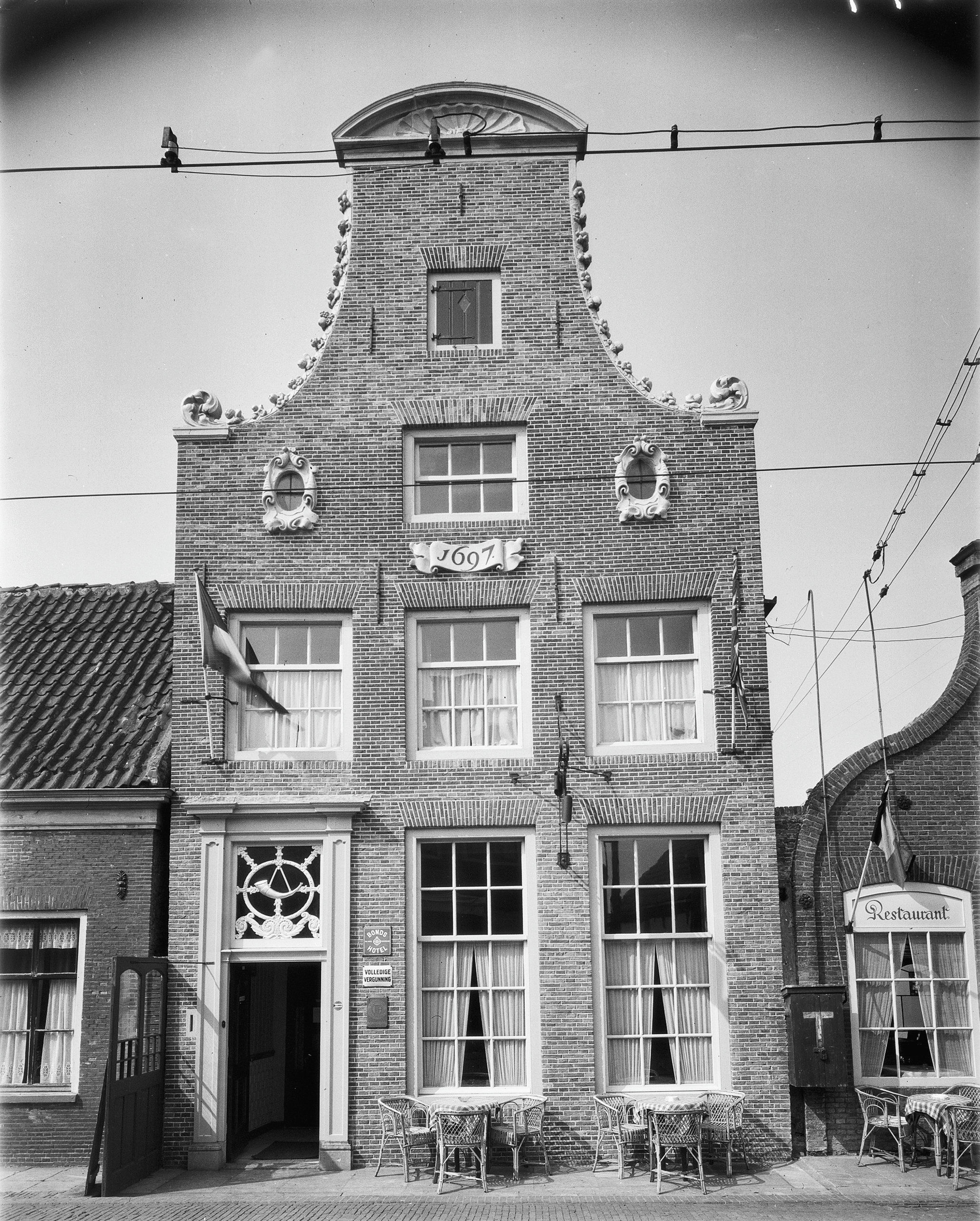 de Posthoorn